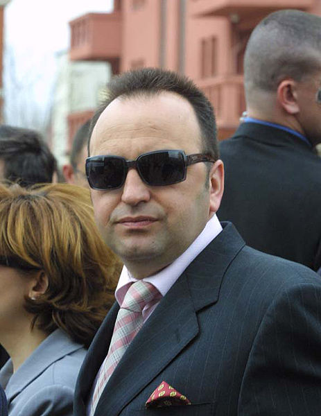 Политичарот и командант Љубе Бошкоски. Извор: тука